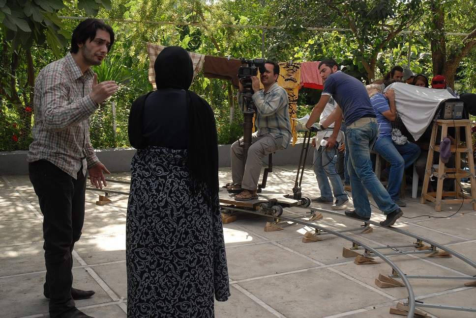 مجموعه تلویزیونی یک روزقبل - کارگردان: صادق کرمیار